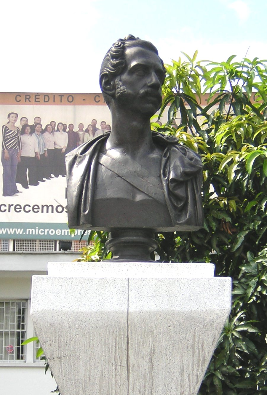 Busto de Tomas Cipriano de Mosquera, ubicado en calle 58 (AV Echeverry) con Cra 49 (Venezuela), Medellín, Colombia